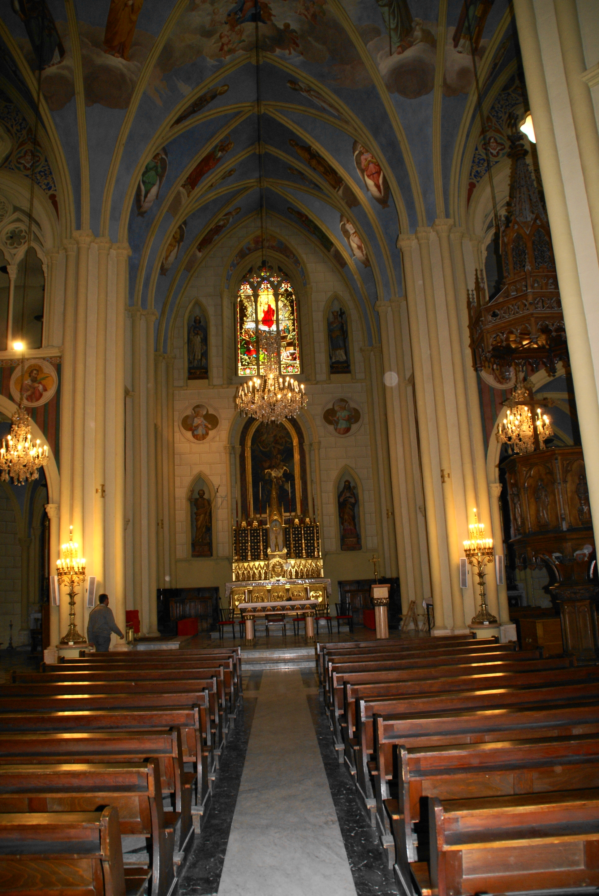 Mittelschiff der Konkathedrale (Bischofskirche) im Lateinischen Patriarchat Jerusalem